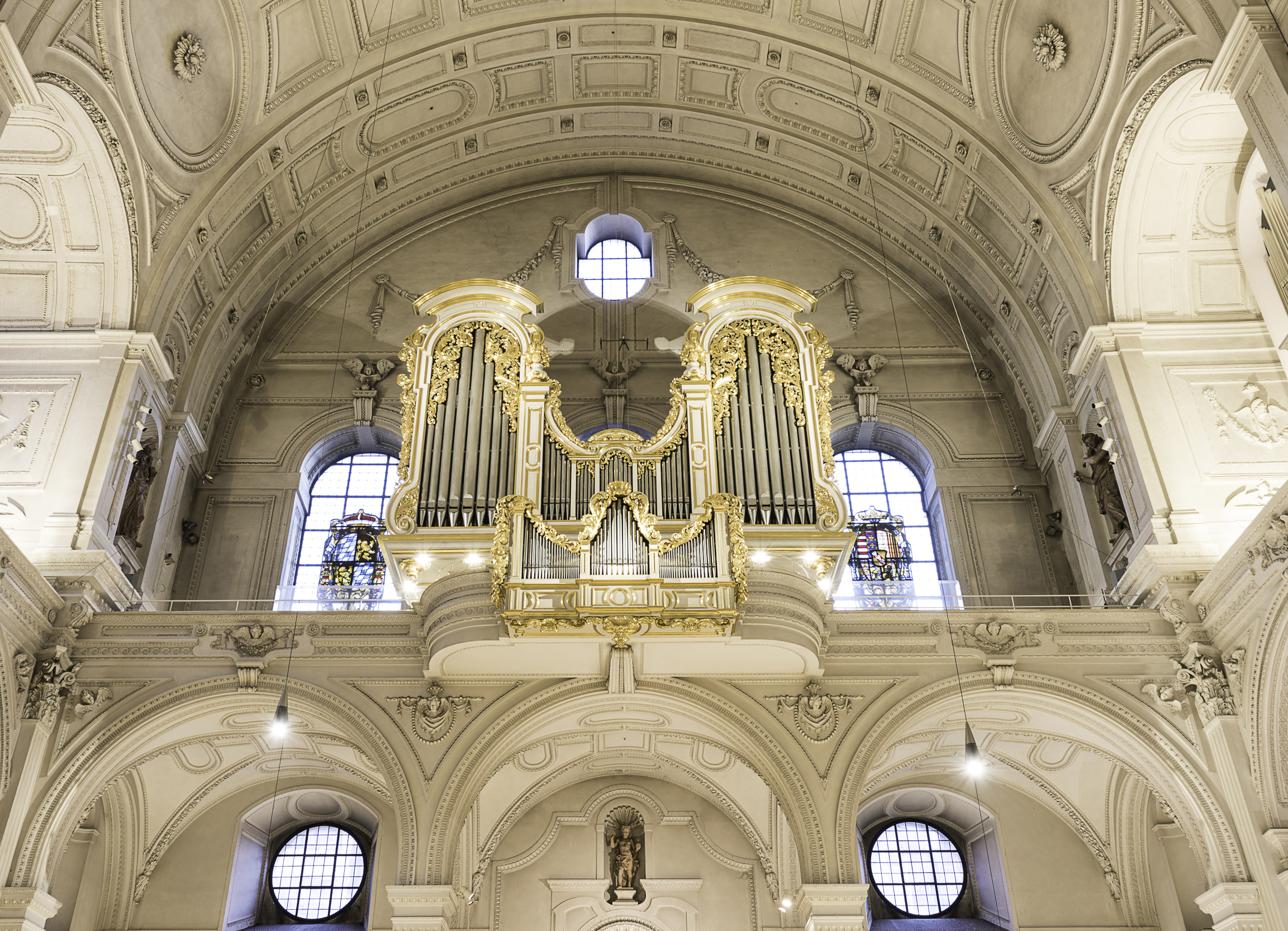 Rieger-Orgel (2011) - Jesuitenkirche St. Michael München